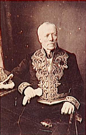 Portrait of Achille Le Tonnelier de Breteuil (1781-1864)